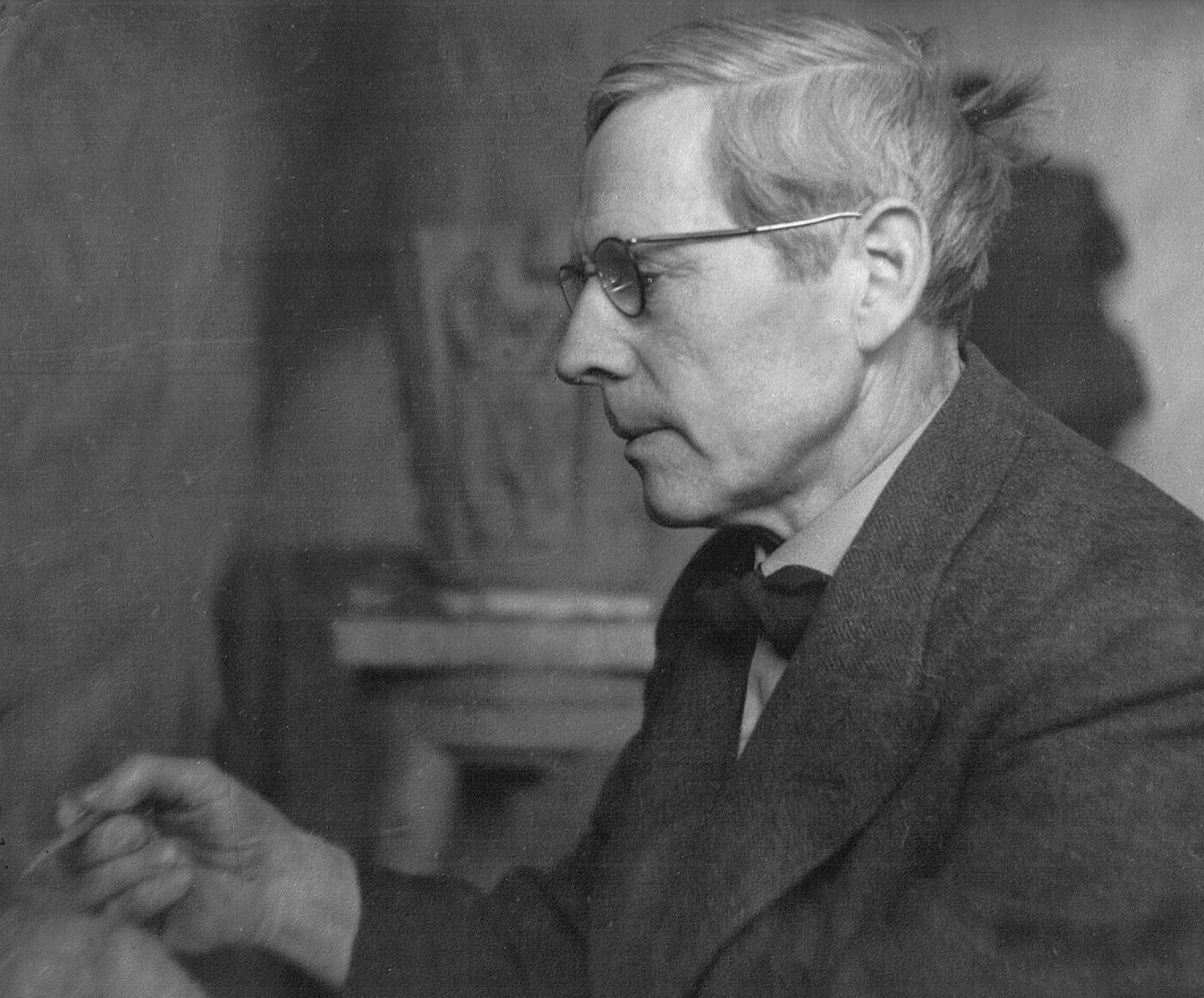 Skulptören Gustaf Sandberg i sin ateljé